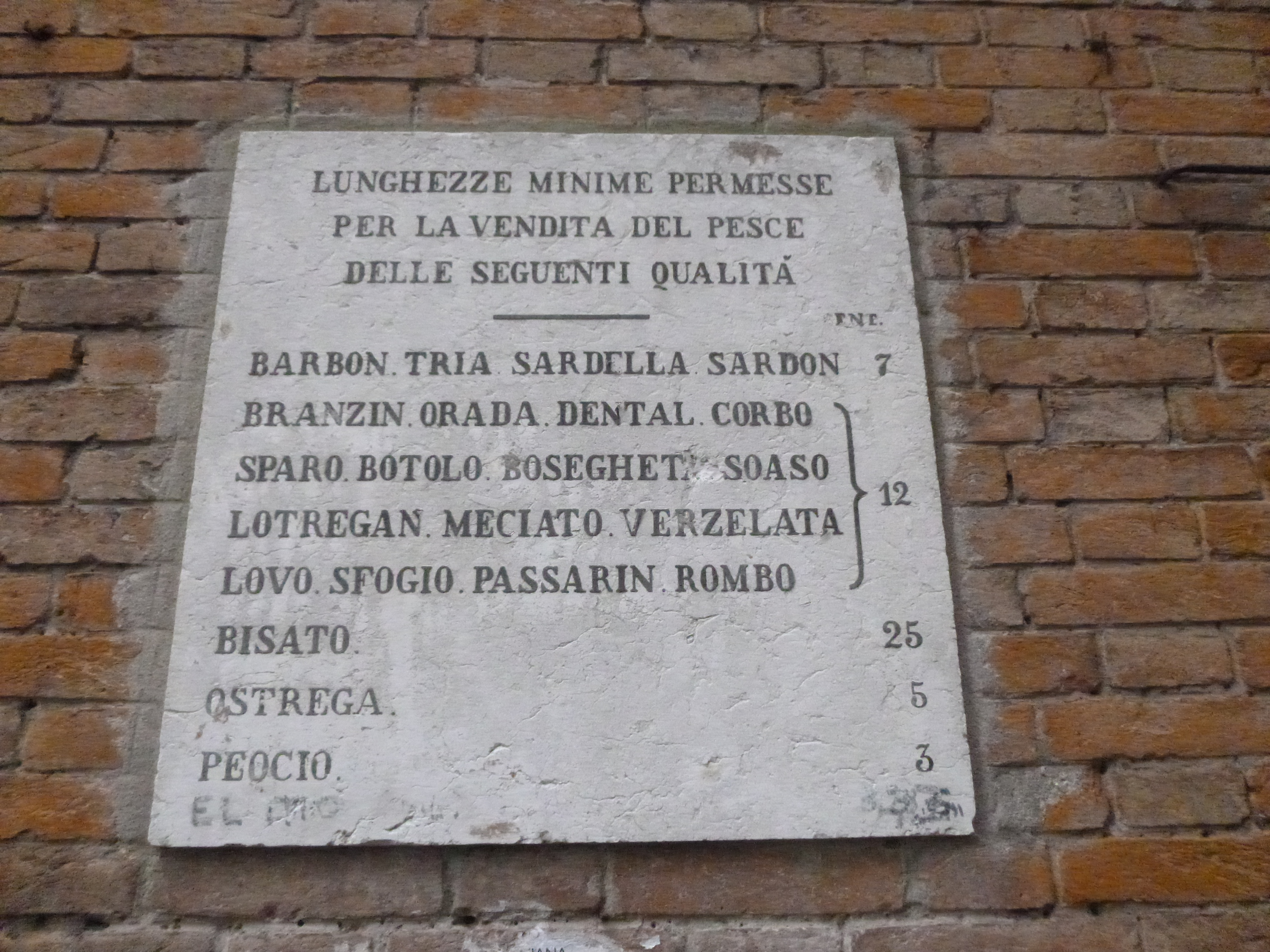 San Polo, 30100 Venice, Italy